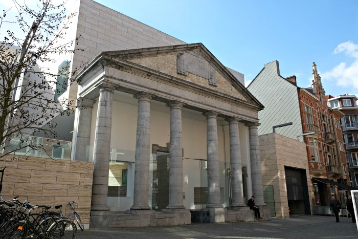 M-Museum